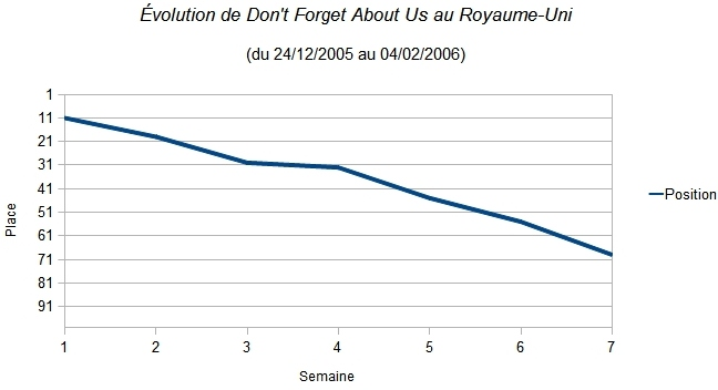 Evolution du classement de Don't Forget About Us de Mariah Carey dans le UK Singles Chart.